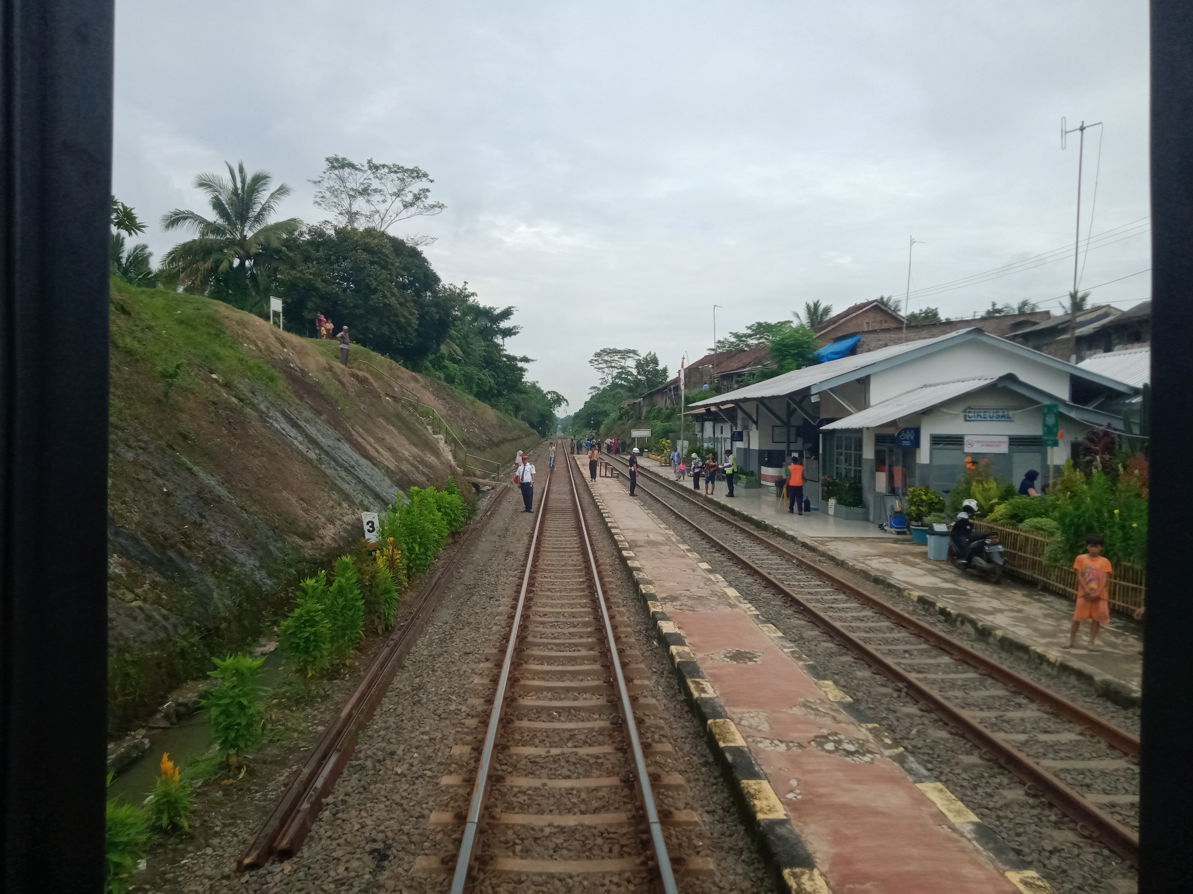 Tampak emplasemen dari Stasiun Cikeusal, 2020